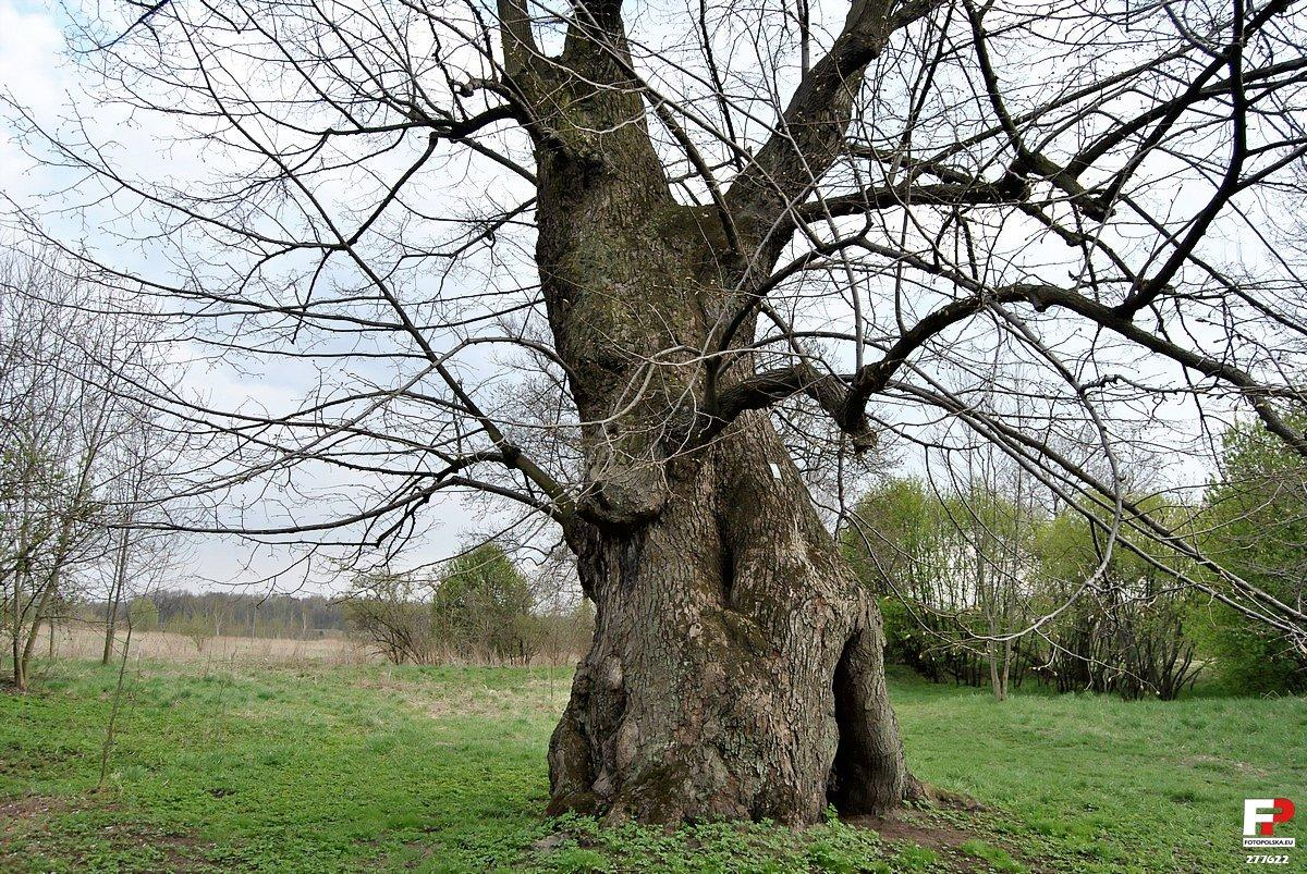 Pień lipy widoczny z bliska. Z bocznego otworu wykonałem fotkę środka pnia